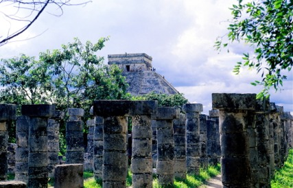 Vista del Templo de las Mil Columnas y Castillo de Chichén Itzá, Yucatán, México.